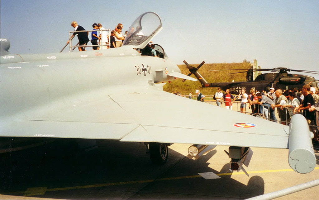 Beschreibung: Eurofighter in Laage, ca 2000